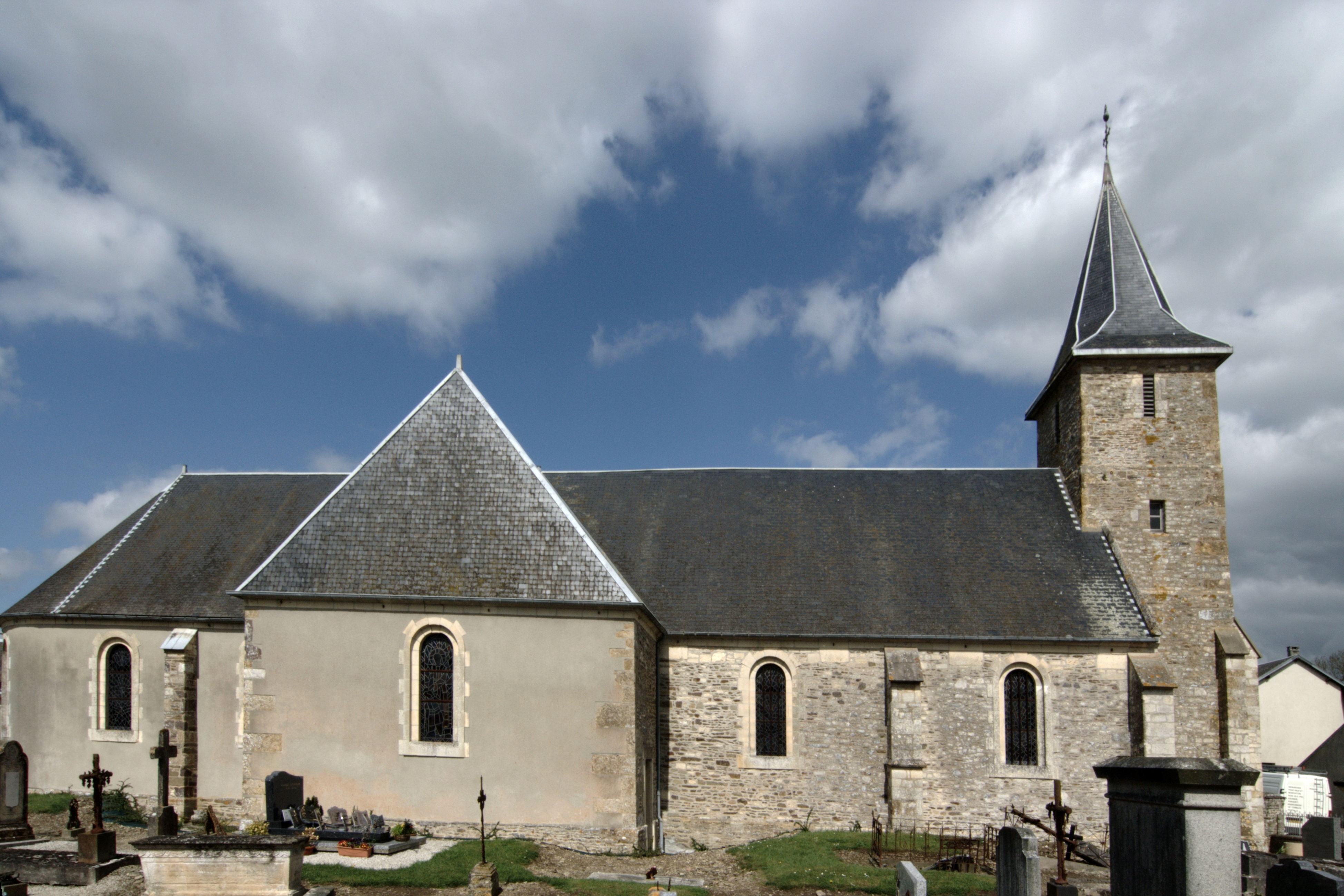 L'église de Hamars, Calvados.